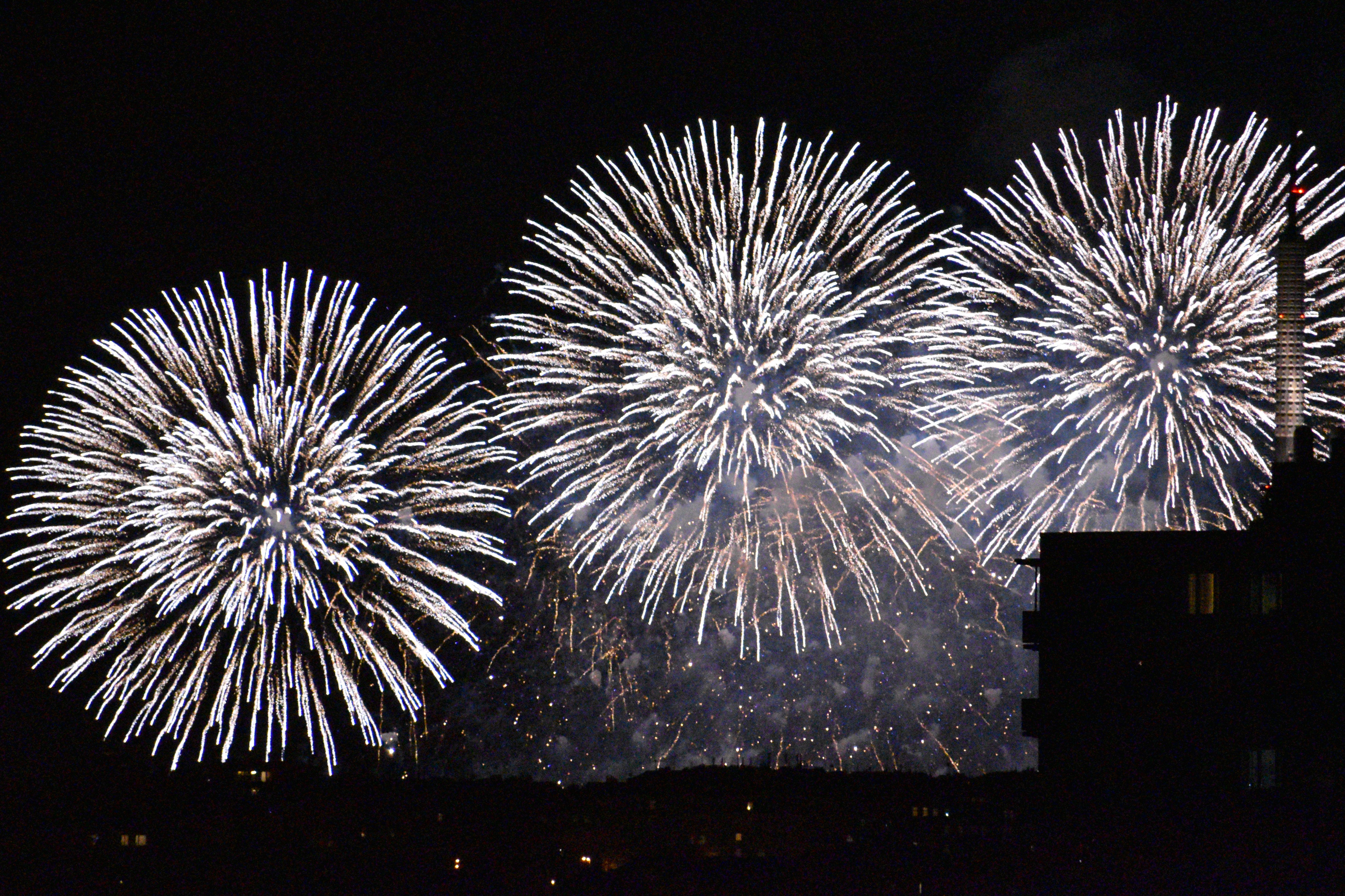 Novoroční Ohňostroj v Praze 2019. Odpálený z Letné 18:11 1.1.2019